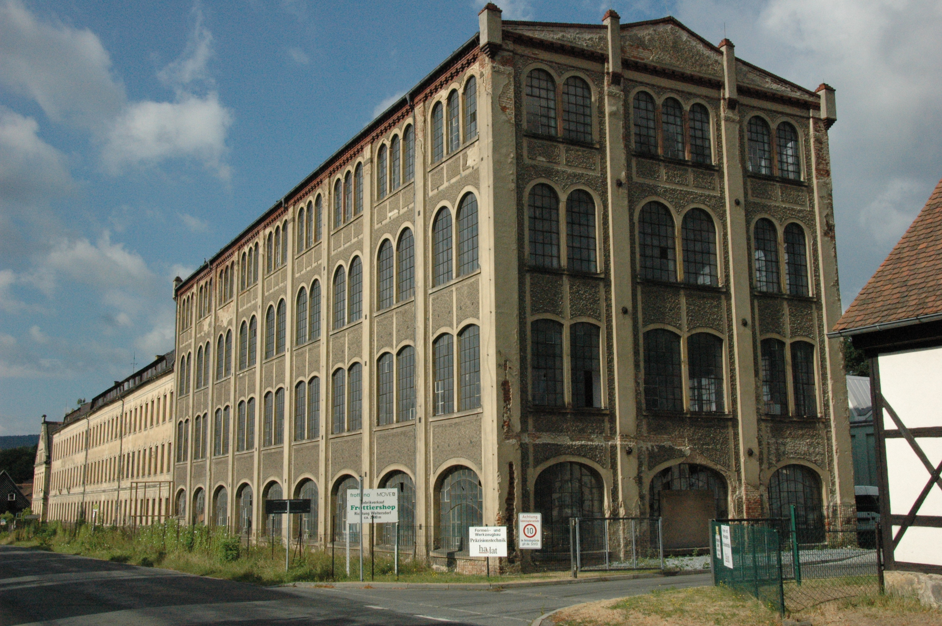 Leerstehende Webfabrik im sächsischen Großschönau